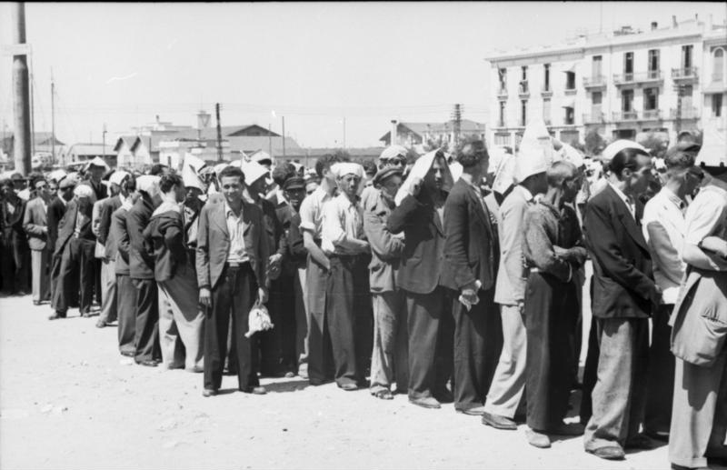 Scherl; Griechenland: In Übereinstimmung zwischen den deutschen und griechischen Stellen werden jetzt die Juden in Griechenland erfasst und einer nutzbringenden Arbeit zugeführt. Kriegsberichter Dick, Juli 1942